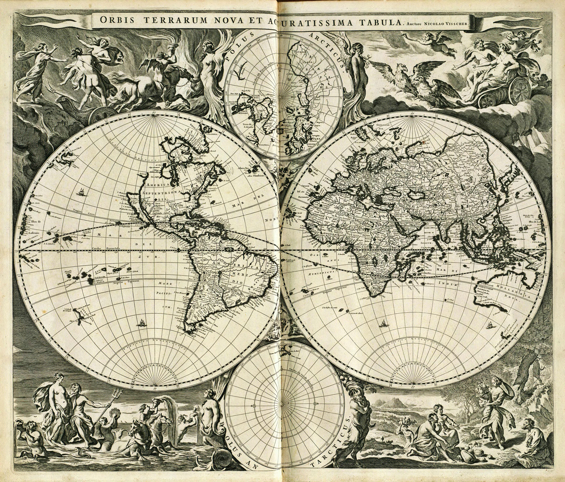 title=Orbis Terrarum Nova et Accuratissima Tabula;size=47x57cm